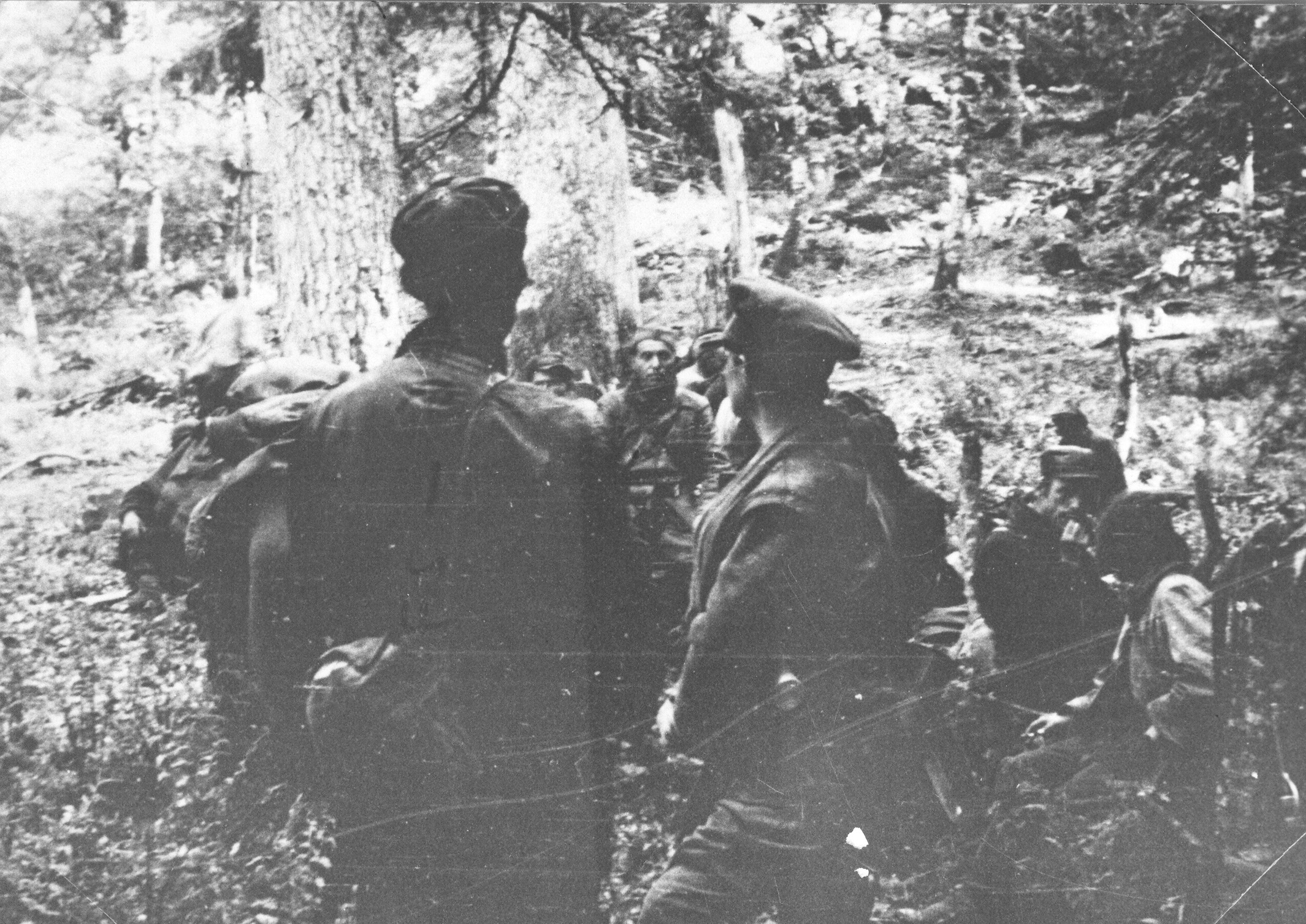 Srpskohrvatski / српскохрватски: Britanska vojna misija na Zelengori, tokom bitke na Sutjesci 1943.